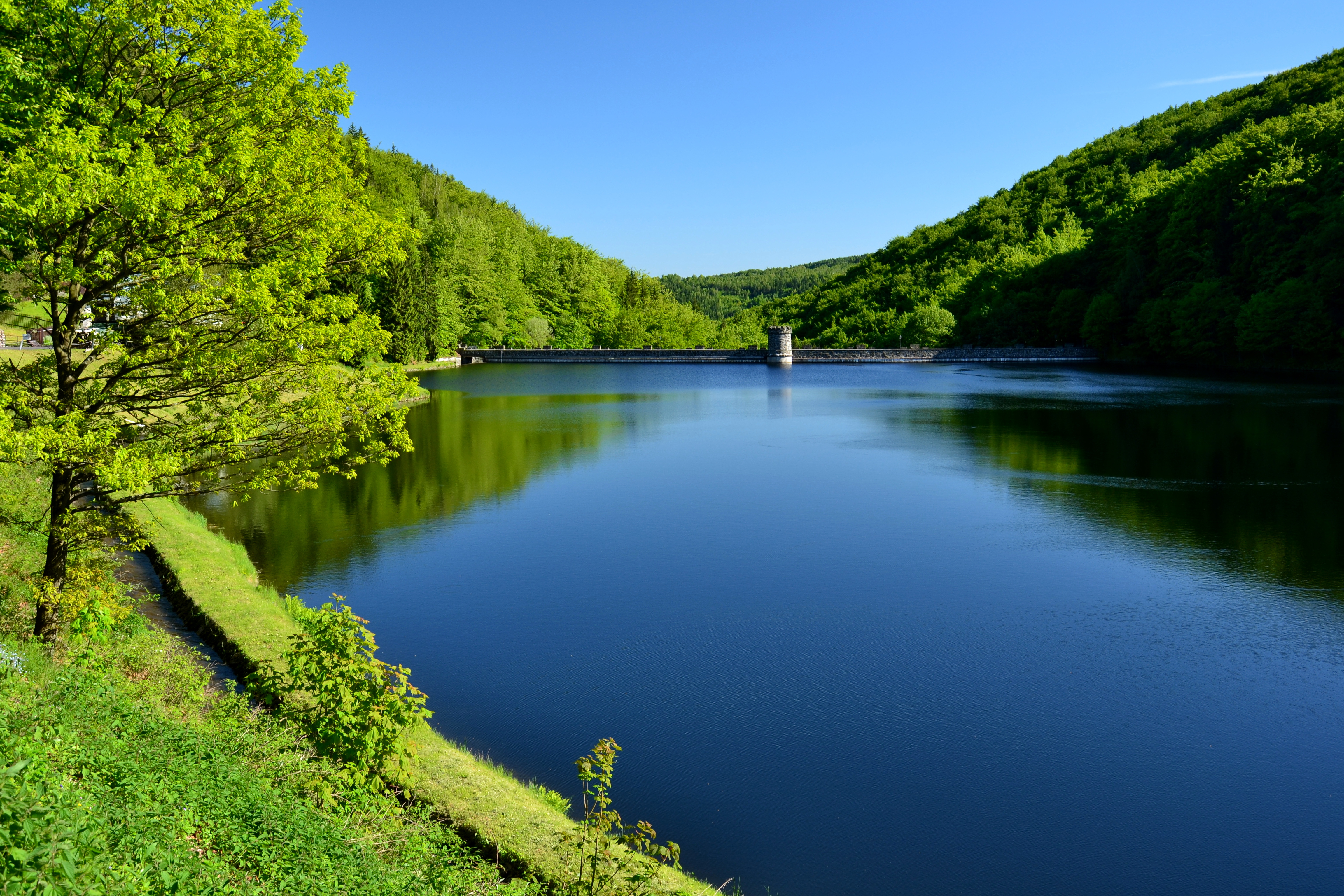 Přírodní park Bezručovo údolí - vodní nádrž Kamenička